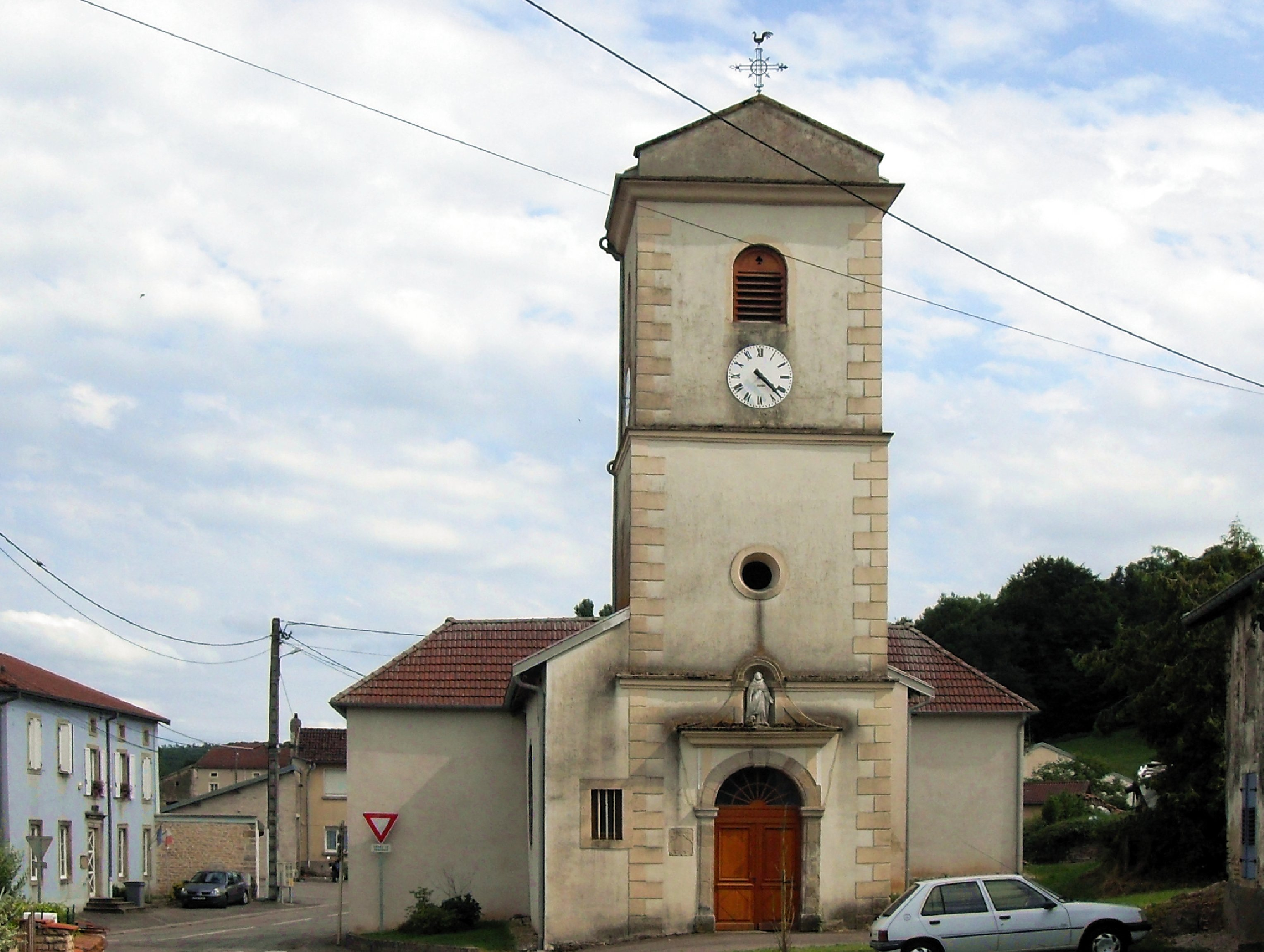 L'église Saint-Domonique d'Avillers